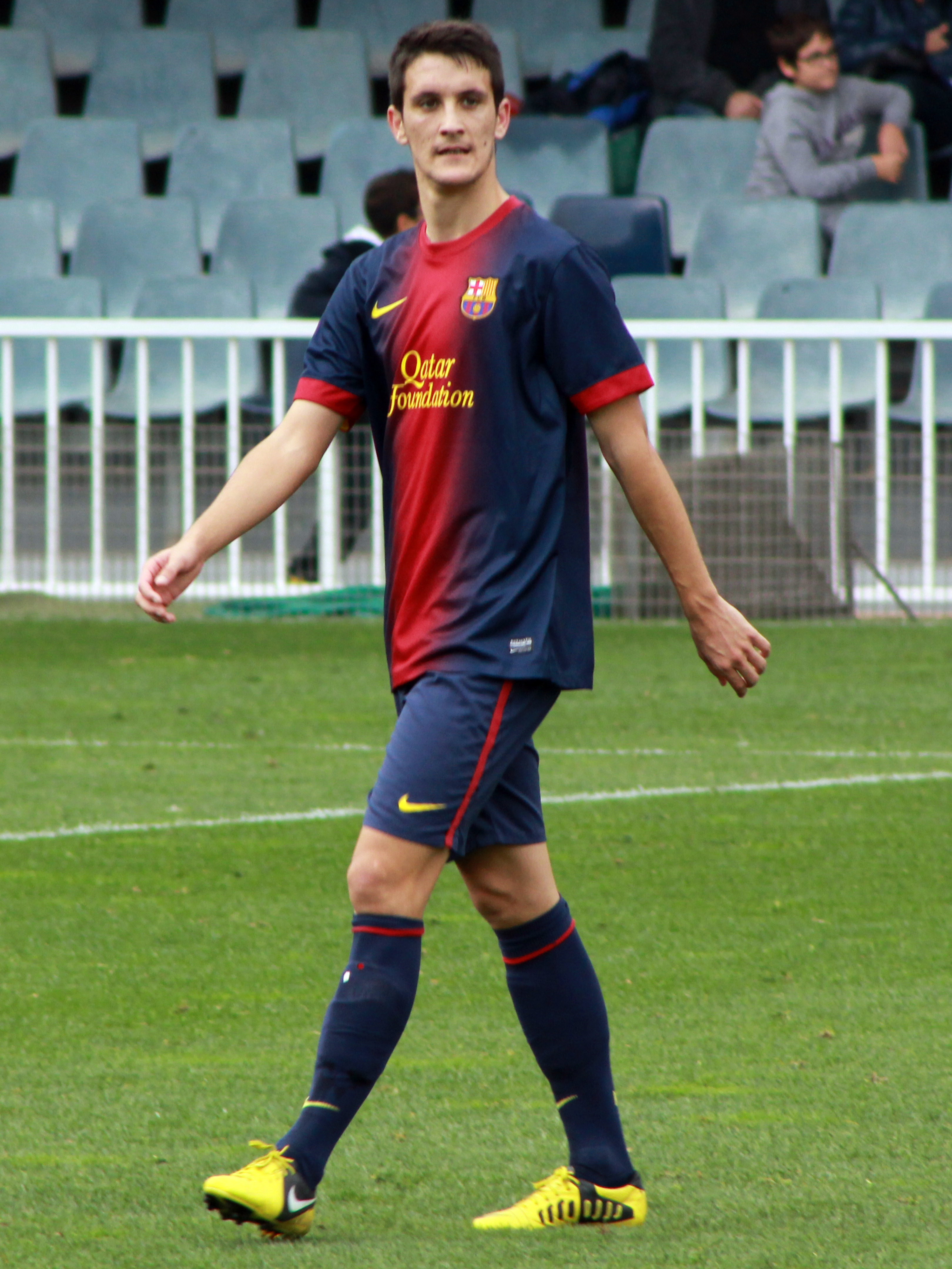 Foto realizada por Javier Segura (@castroquini en Twitter)